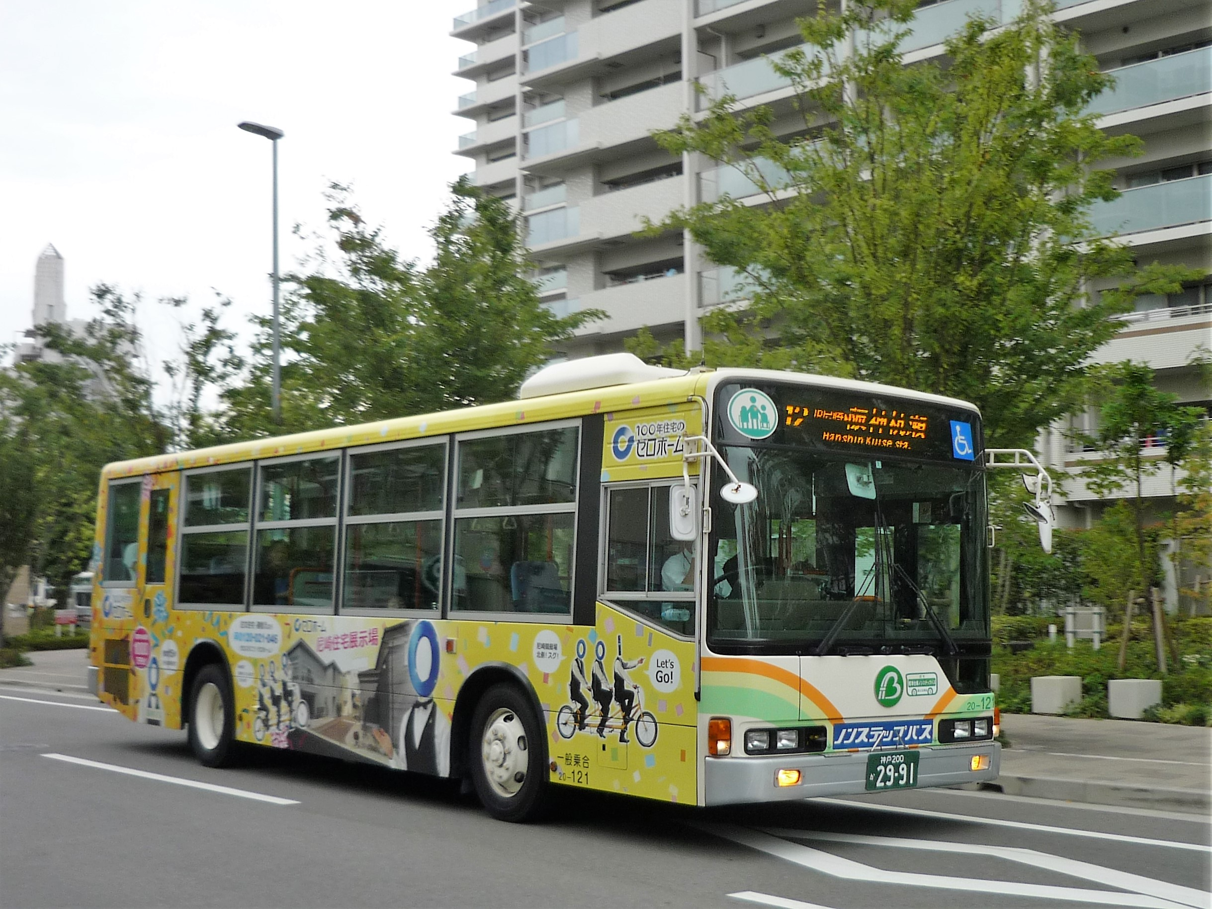 JR塚口駅付近を走行する阪神バス・尼崎市内線